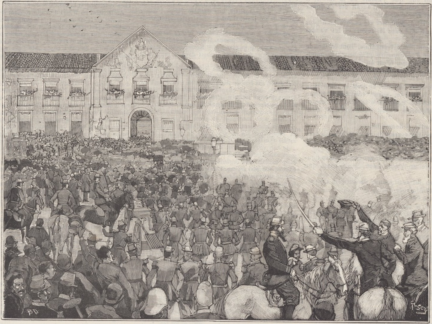 La Revolution au Brésil. — La Proclamation de la République a Rio-Janeiro. — (Dessin de M. Georges Scott.). — (D'après les documents communiqués par M. Édouard Garrido, à Rio-Janeiro.)